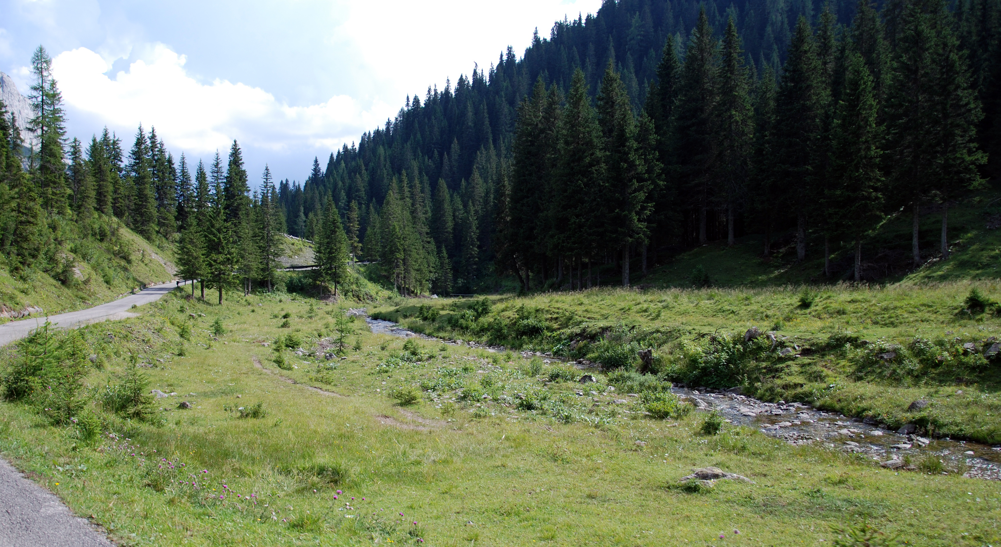 Piave in Val Seis